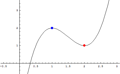 Afbeelding voor wiskundige pagina over extrema. Afbeelding mag vrij gebruikt worden.